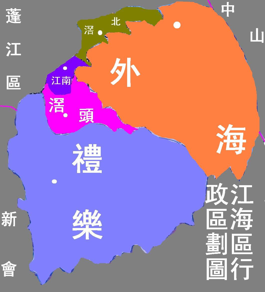 江海區行政區劃圖